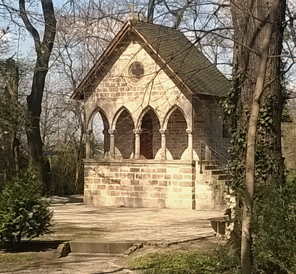 Warmsdorf